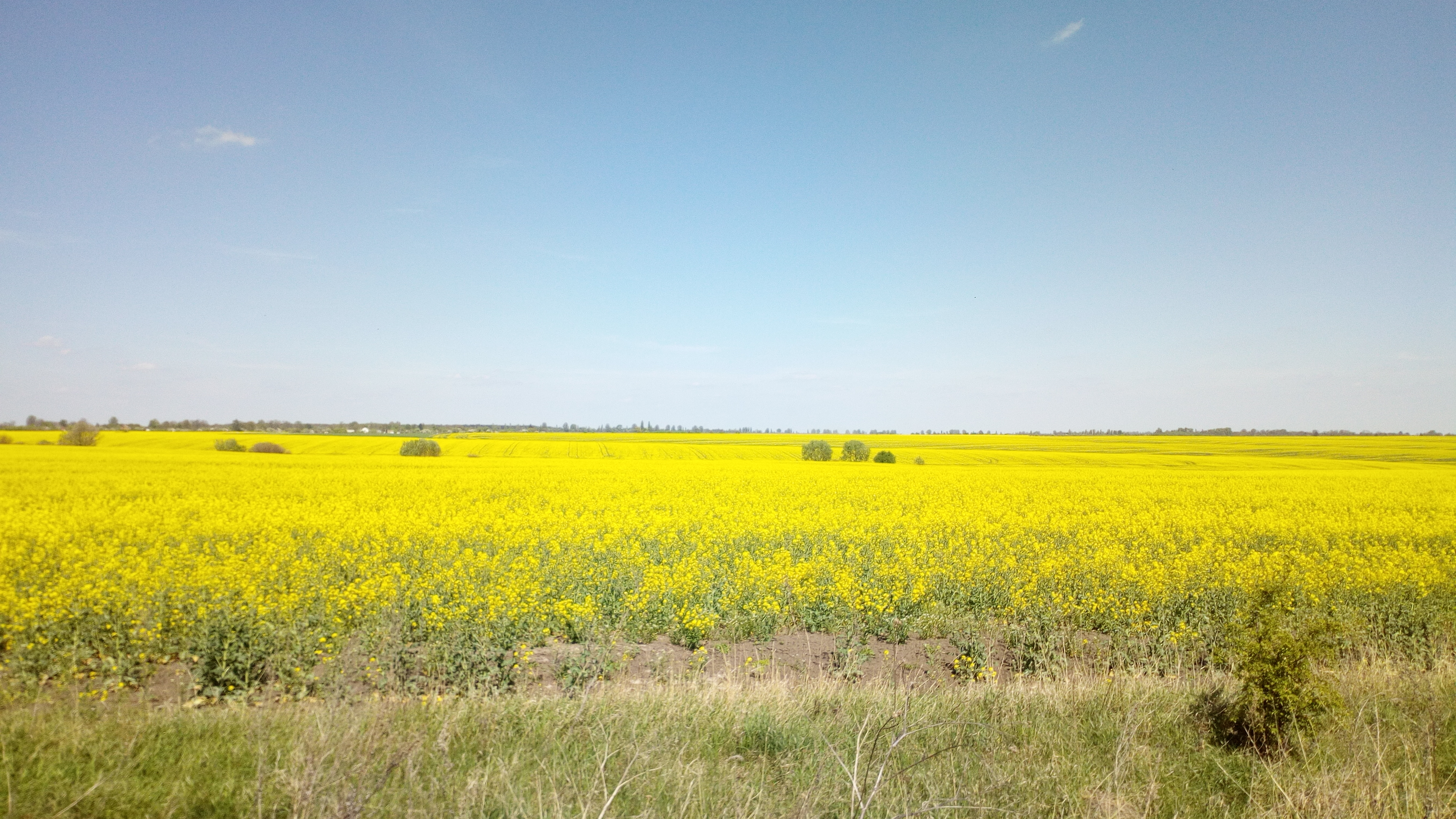 Поле. Ріпак.